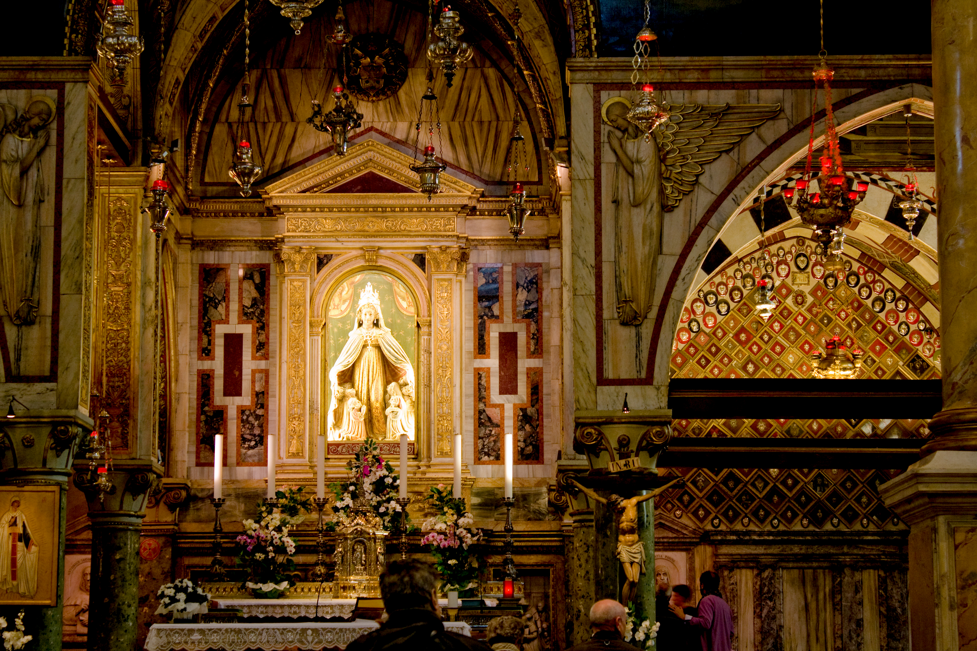 Vicenza - Interno della Basilica di Monte Berico